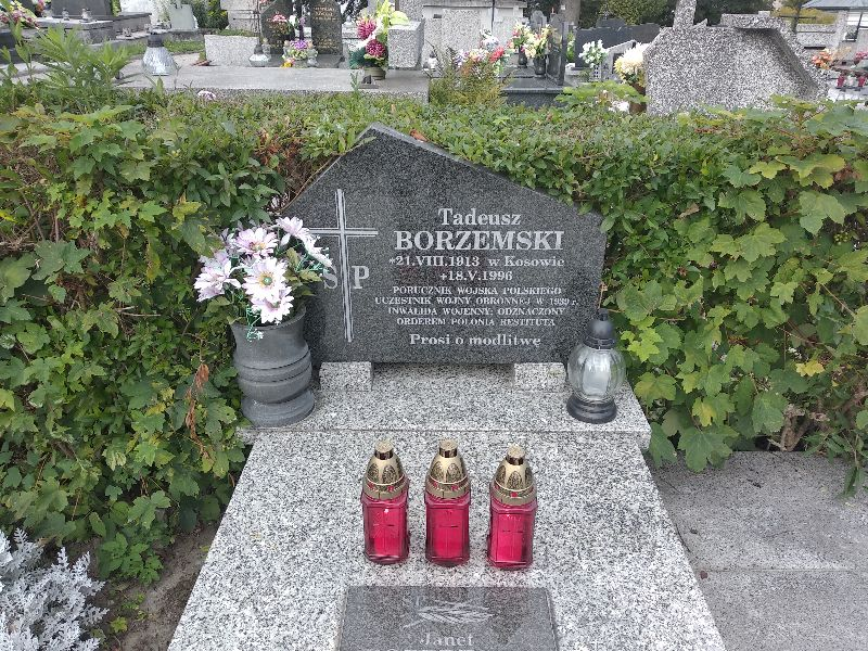 Nagrobek - Tadeusz Borzemski, cmentarz parafialny w Muszynie